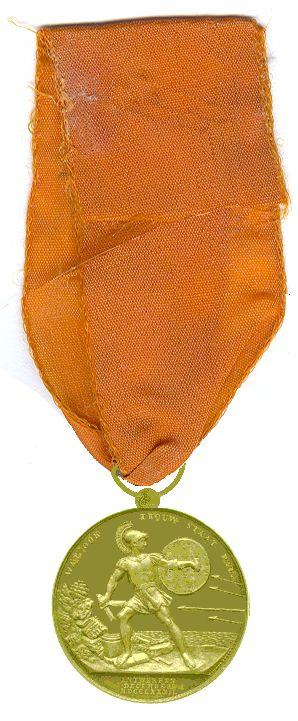 De door een Amsterdamse "Commissie van Erkentenis" als particulier huldebetoon aan de Nederlandse verdedigers van de Citadel van Antwerpen aangeboden medaille. De bezitter heeft de medaille zelf van een oog en een lint laten voorzien.